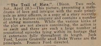 Reseña de la película The Trail of Hate (1917) que atribuye su dirección a Francis Ford, dando lugar a la polémica respecto a si el director fue él o su hermano Jack.